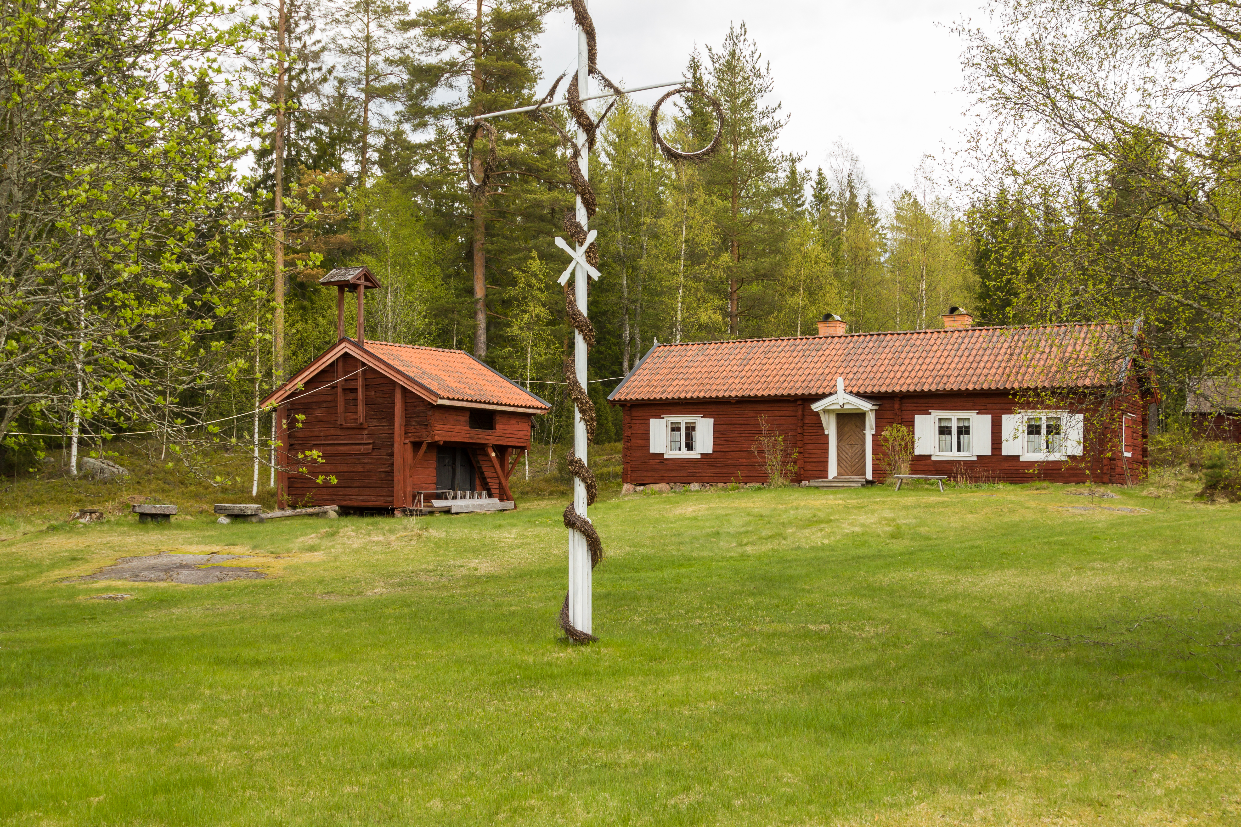 Garpenbergs gammelgård, Hedemora kommun, Dalarnas län, Sverige.